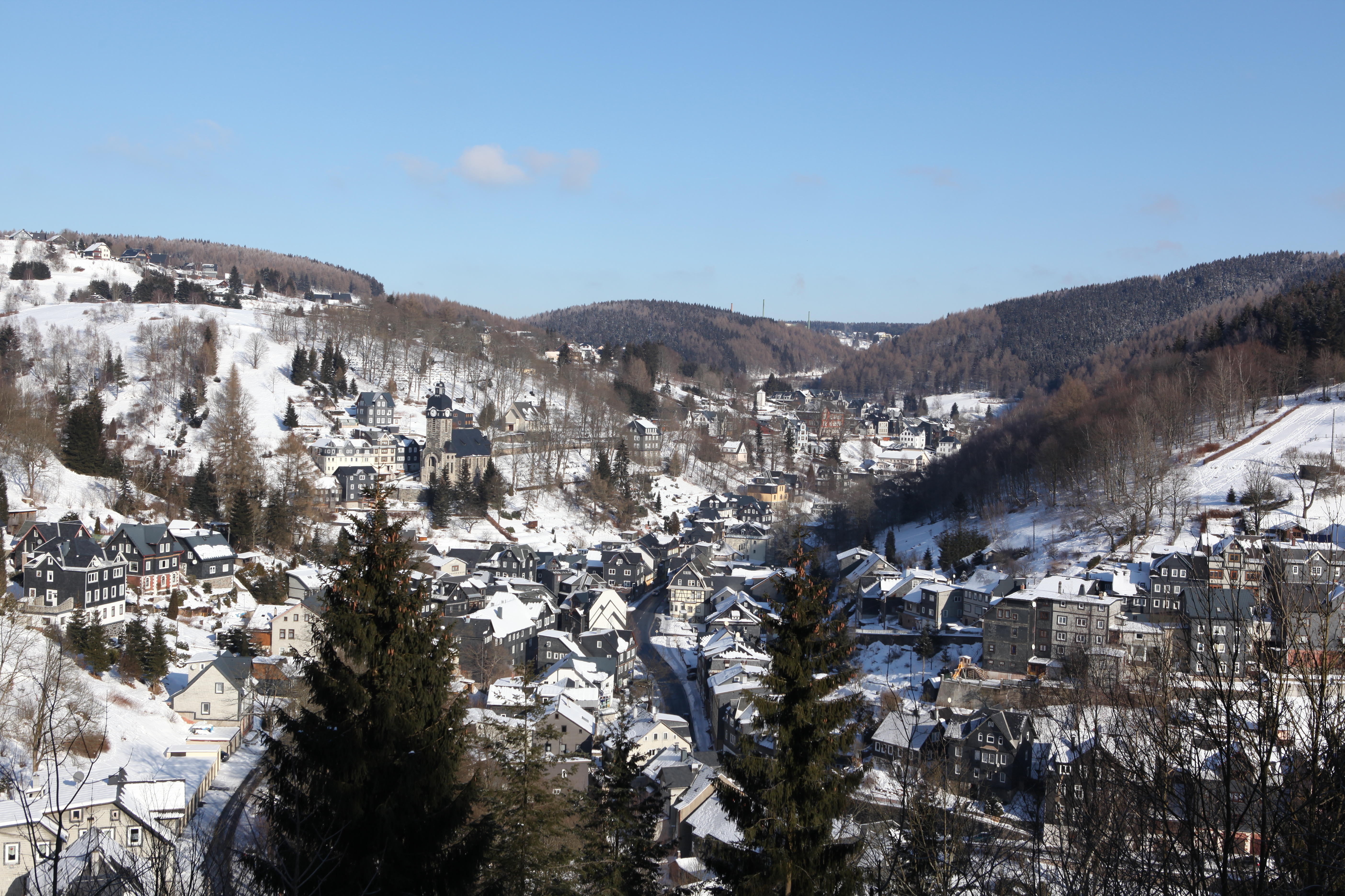 Lauscha